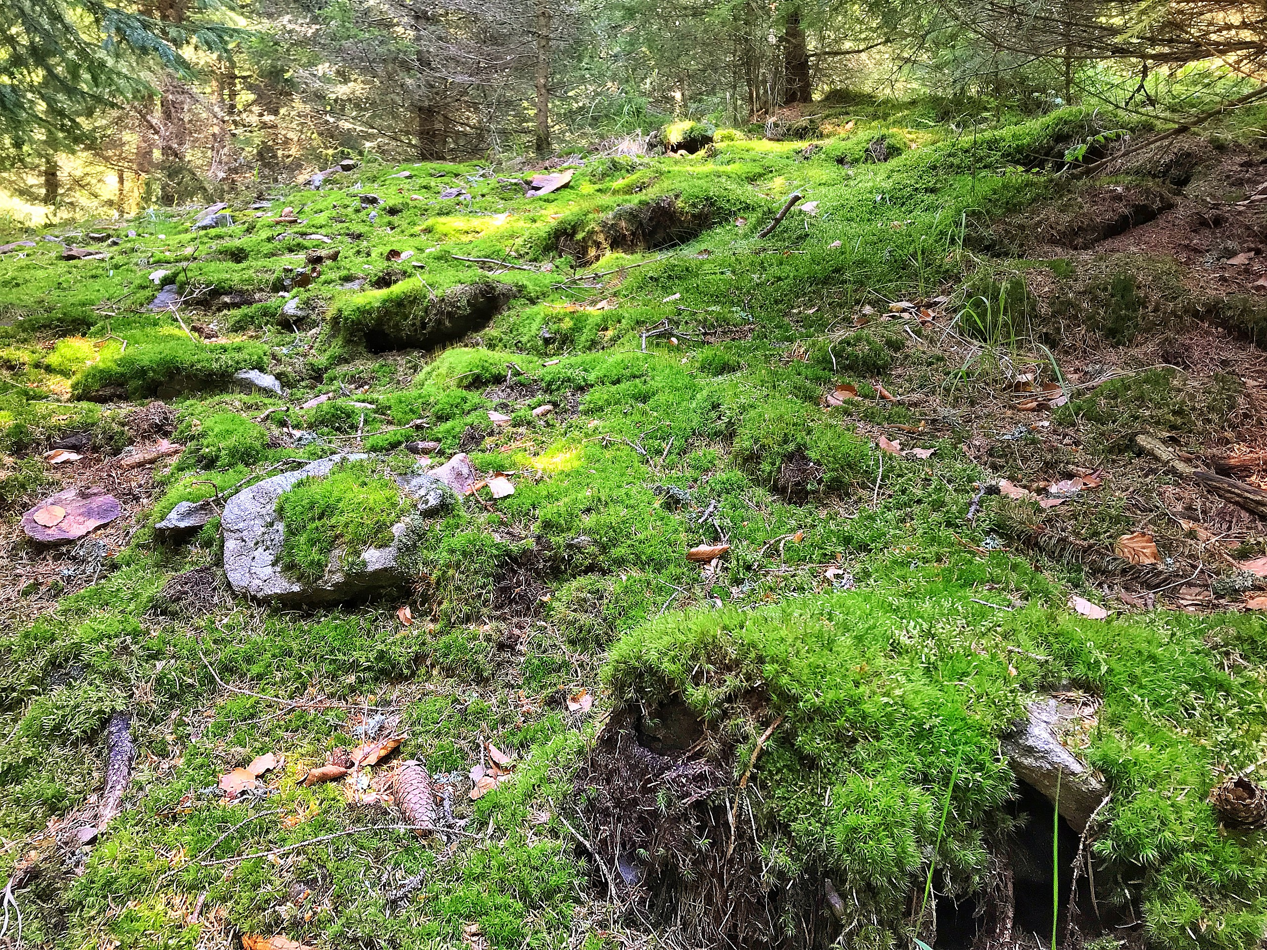 Vrchol Obrovce (1146 m) na Šumavě